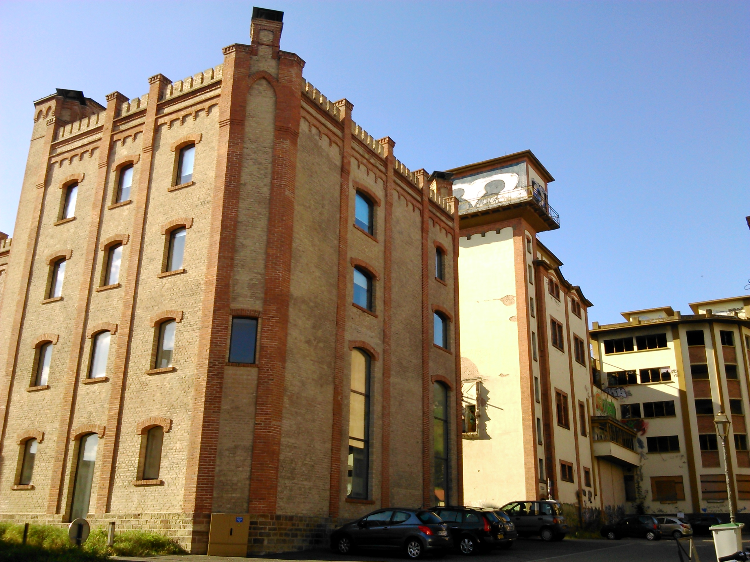 Ancienne brasserie Mutzig.